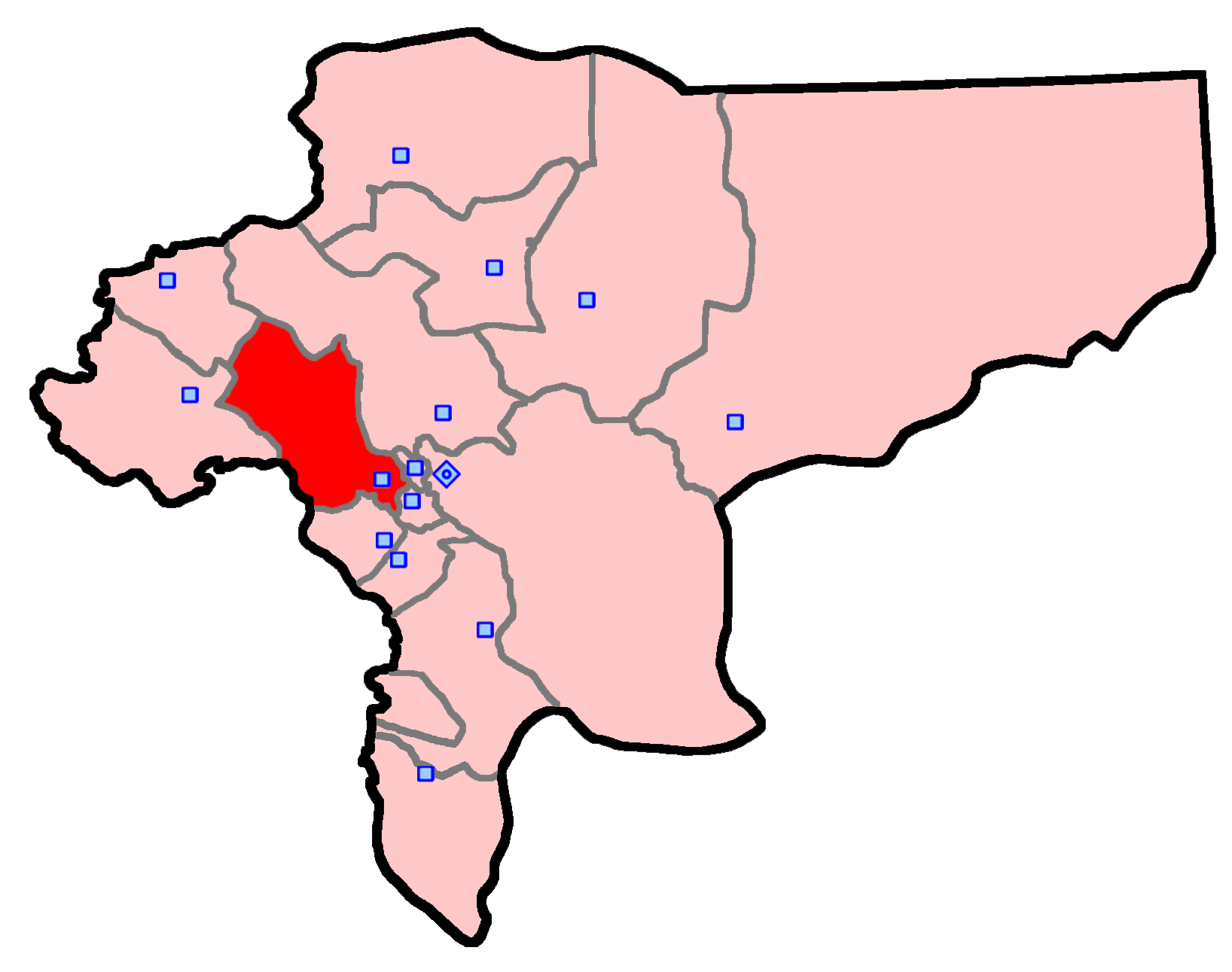 حوزهٔ انتخاباتی نجف‌آباد و تیران و کرون برای انتخابات مجلس شورای اسلامی